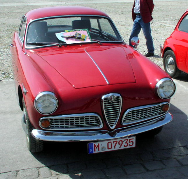 Alfa Romeo Giulietta Sprint